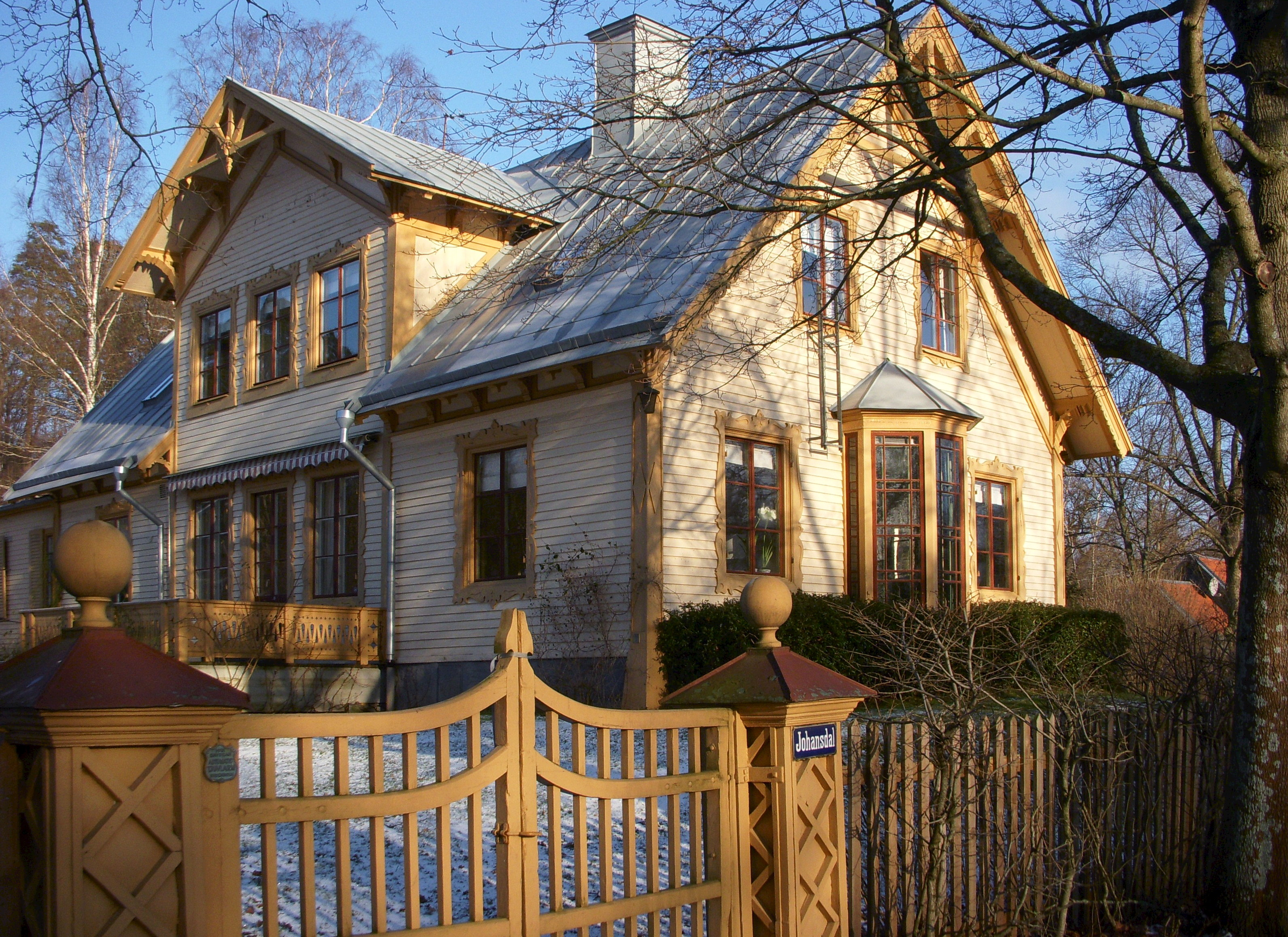 Johansdal fasad mot sydväst